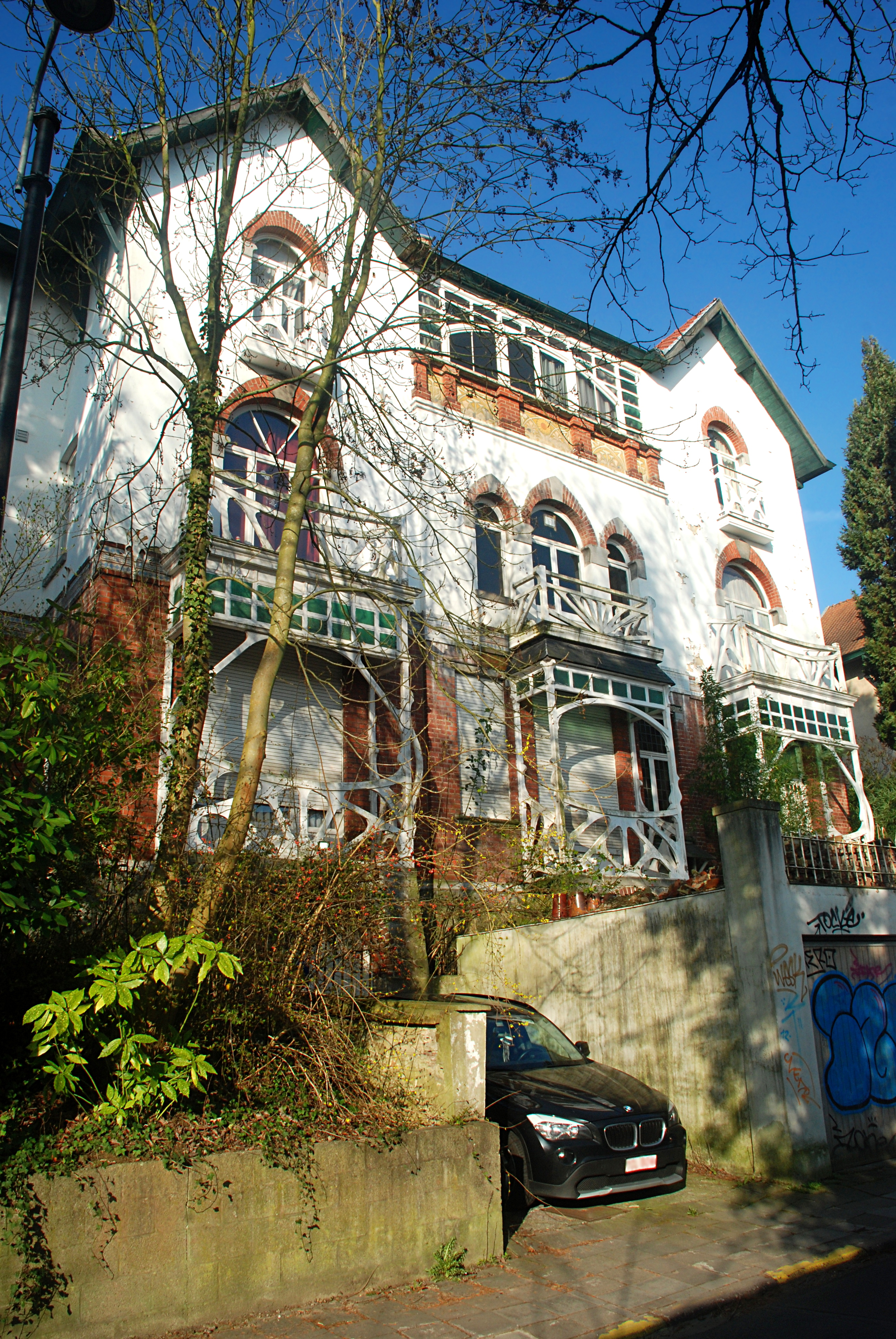 Belgique - Bruxelles - Watermael - William Jelley - Villas Art nouveau - Avenue des Taillis 11-15